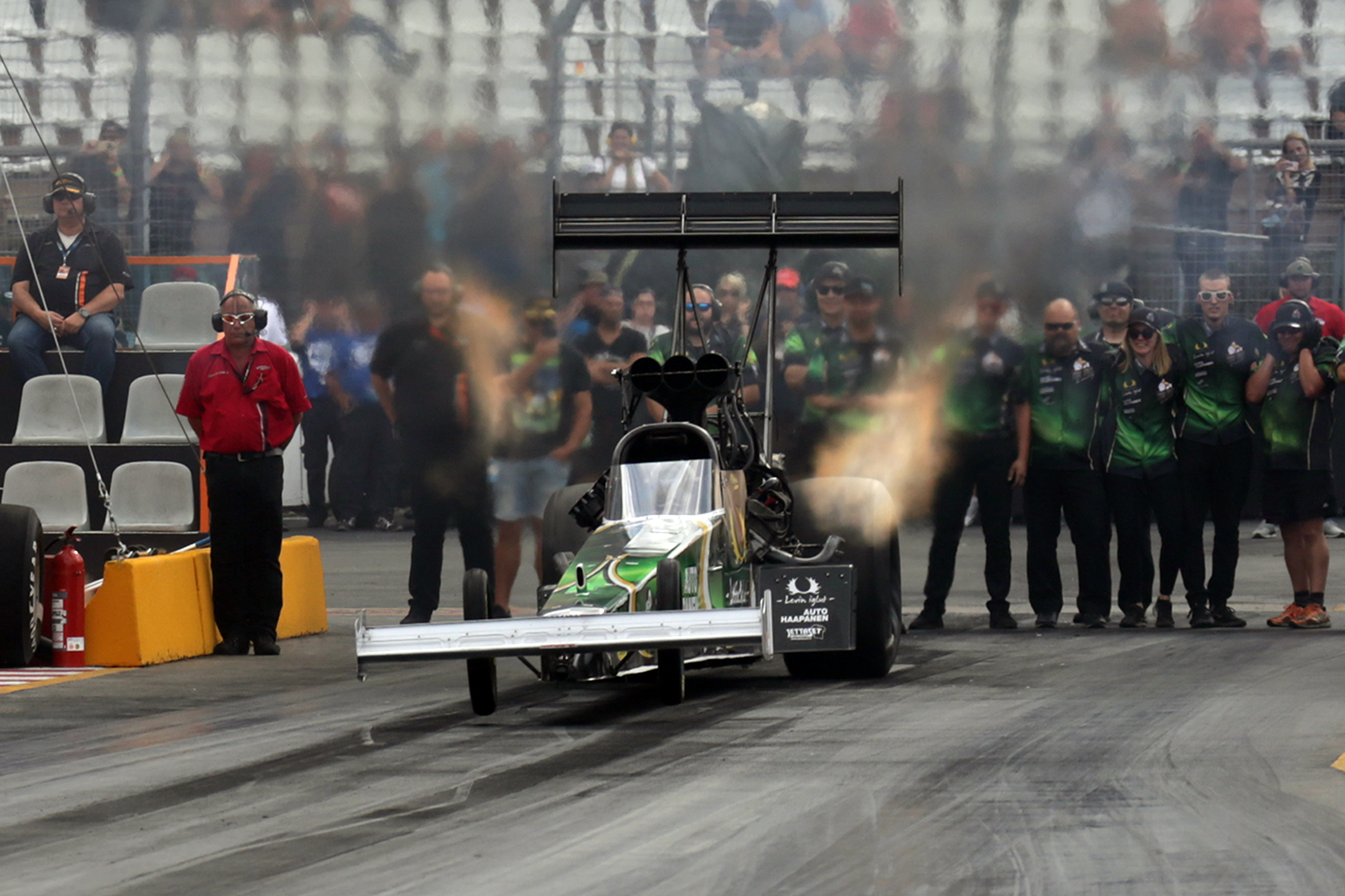 FIA Top Fuel Dragster. Driver: Anita Mäkelä (FIN) NOX 2019